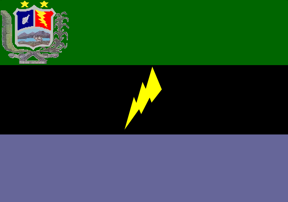 Bandera del municipio Catatumbo, estado Zulia, Venezuela